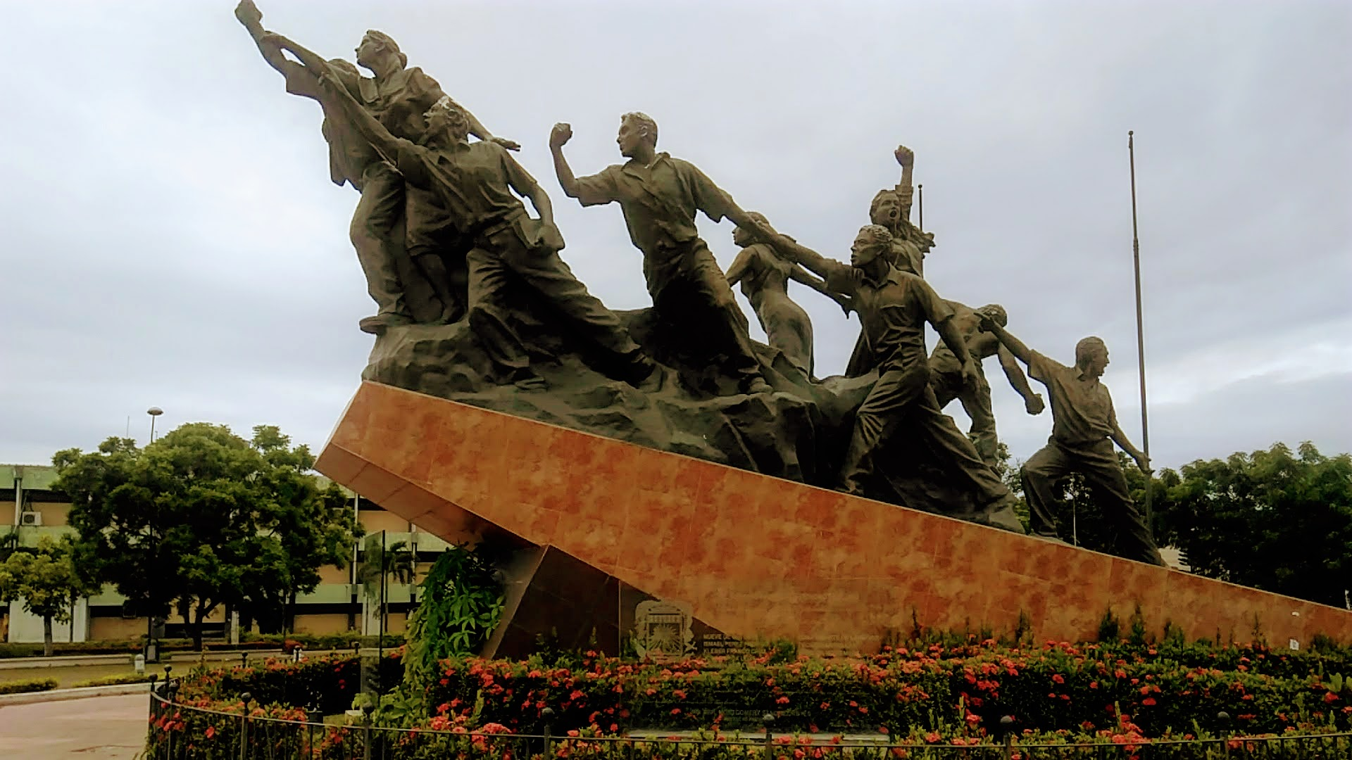 Monumento institucional de la UTMACH